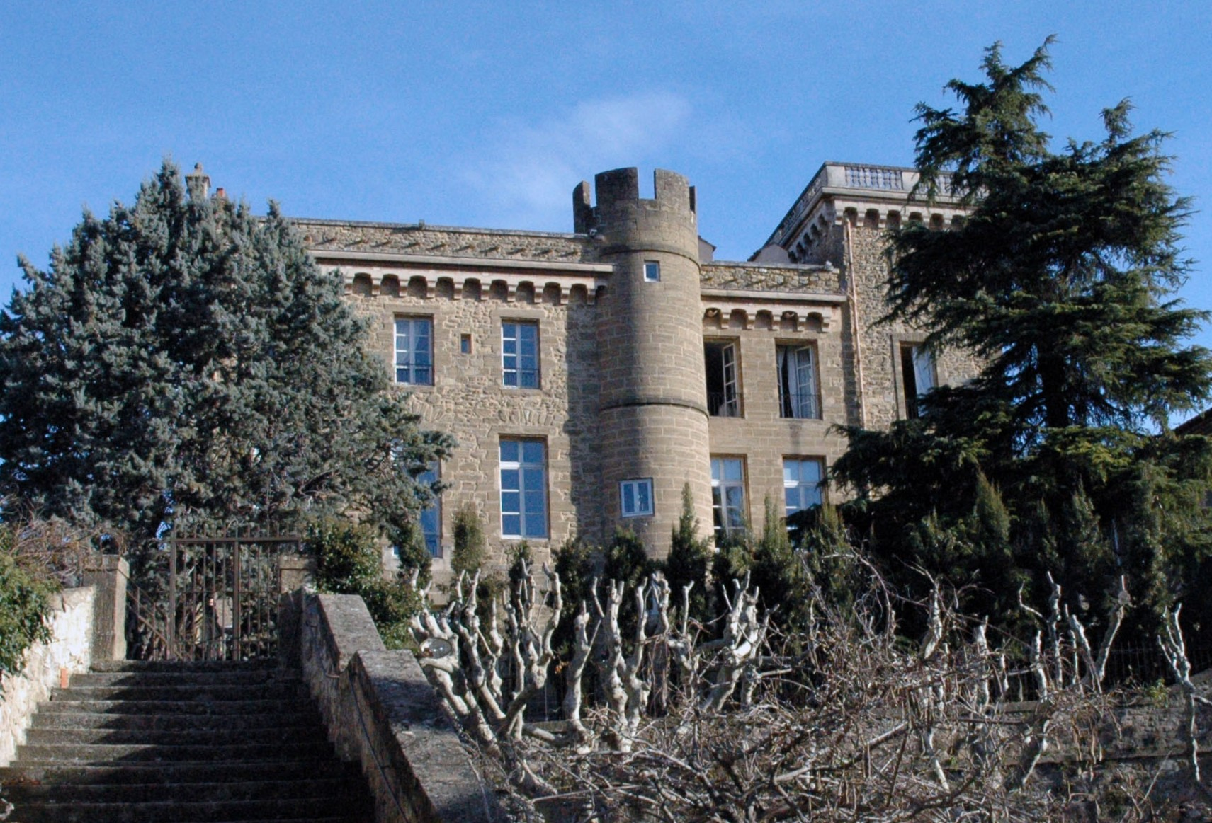 Château de Rochegude, Rochegude, Drôme, France